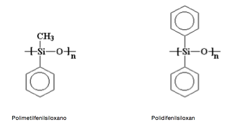 Composición Quimica Silicona